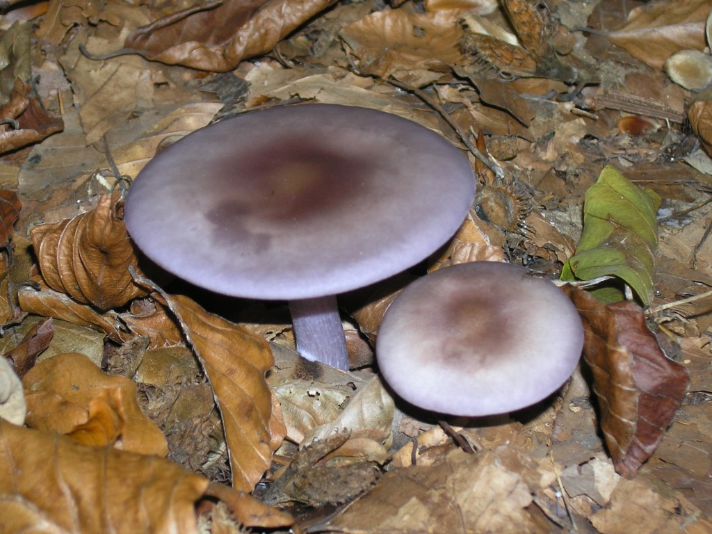 Violetter Rötelritterling (Lepista nuda)